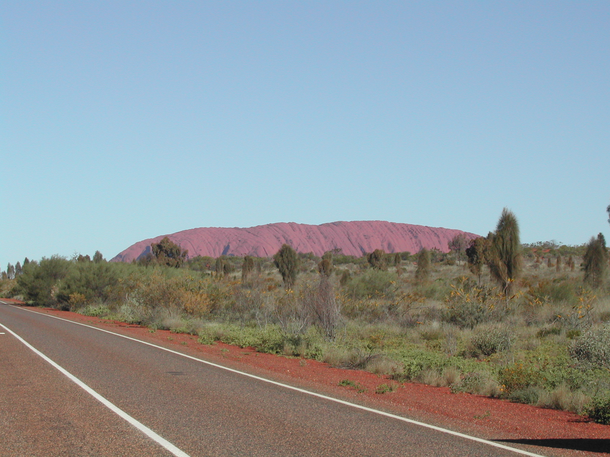 Den Uluru am Nationalpark Uluru - Kata Tjuta Nationalpark.